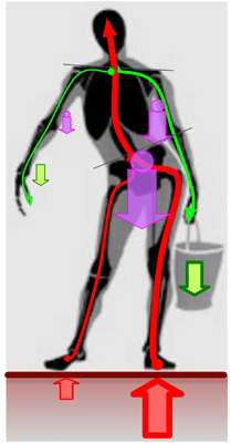 Title: Flusso di forze nel corpo umano Author: Peter Forster Authors Position: Naturopata, Docente Caption: Materiale didattico: Medicina popolare: Materia medica: Sistema motorio somatico: Lucidi Caption Writer: Peter Forster Job Name: MmP 21 Copyright: Copyright Notice: GFDL, Fair Use Owner URL